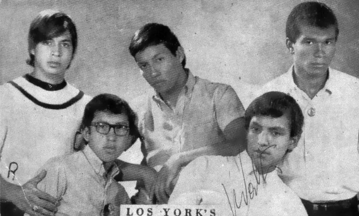 Los York's en 1966 a comienzo de la formación de ka agrupación musical. Foto por Discos MAG